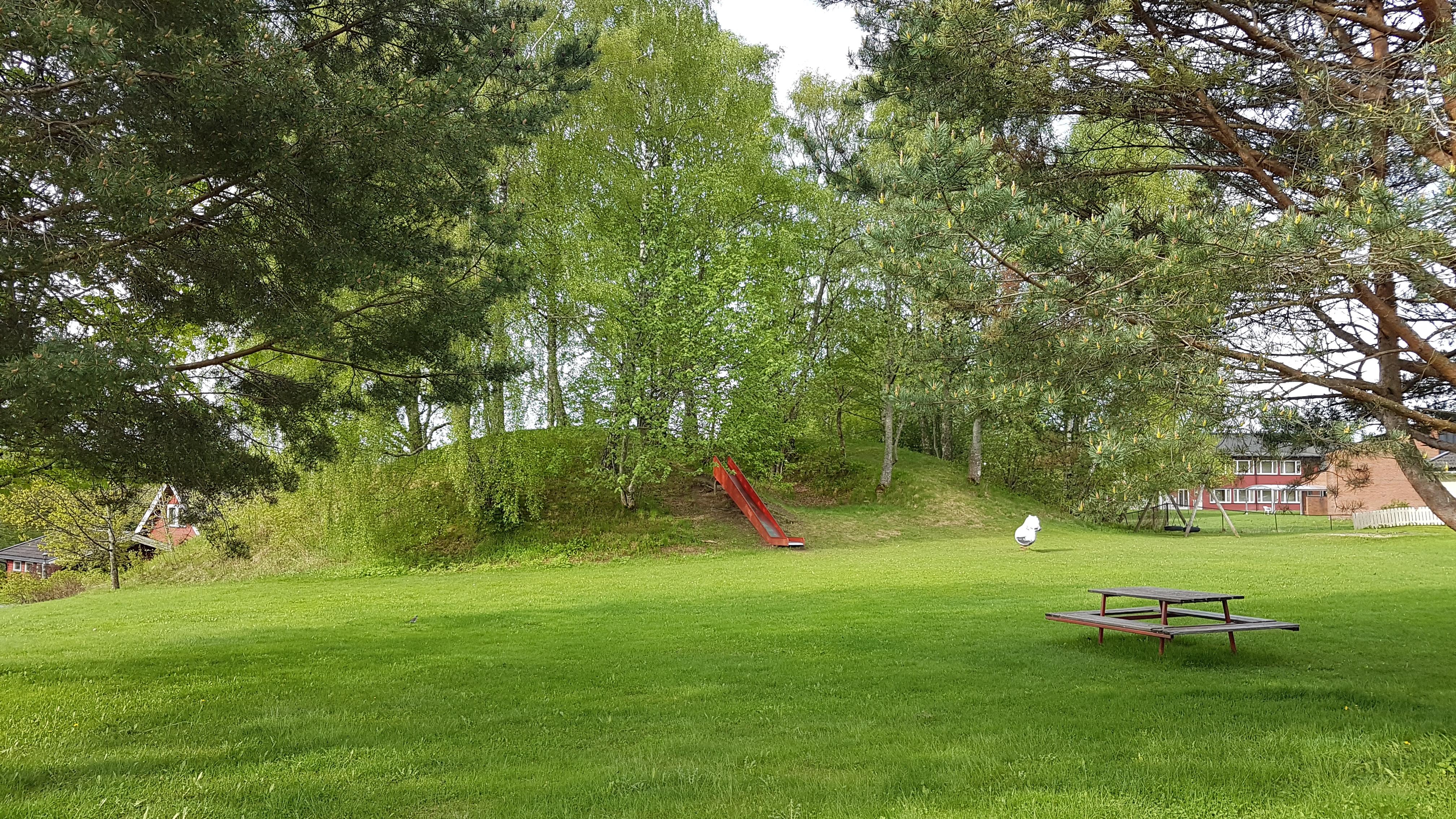 Liljekonvallhaugen er en gravhaug fra jernalder